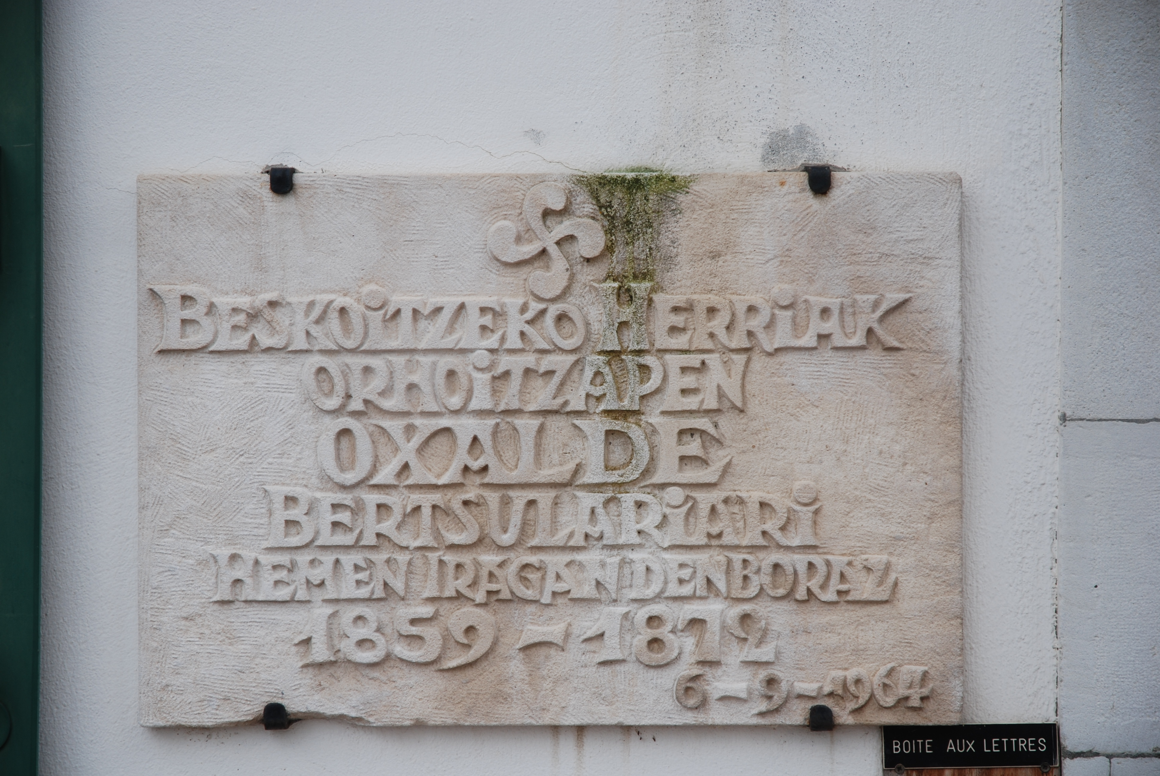 Otsalderen omenezko oroitarria, Beskoitzen.